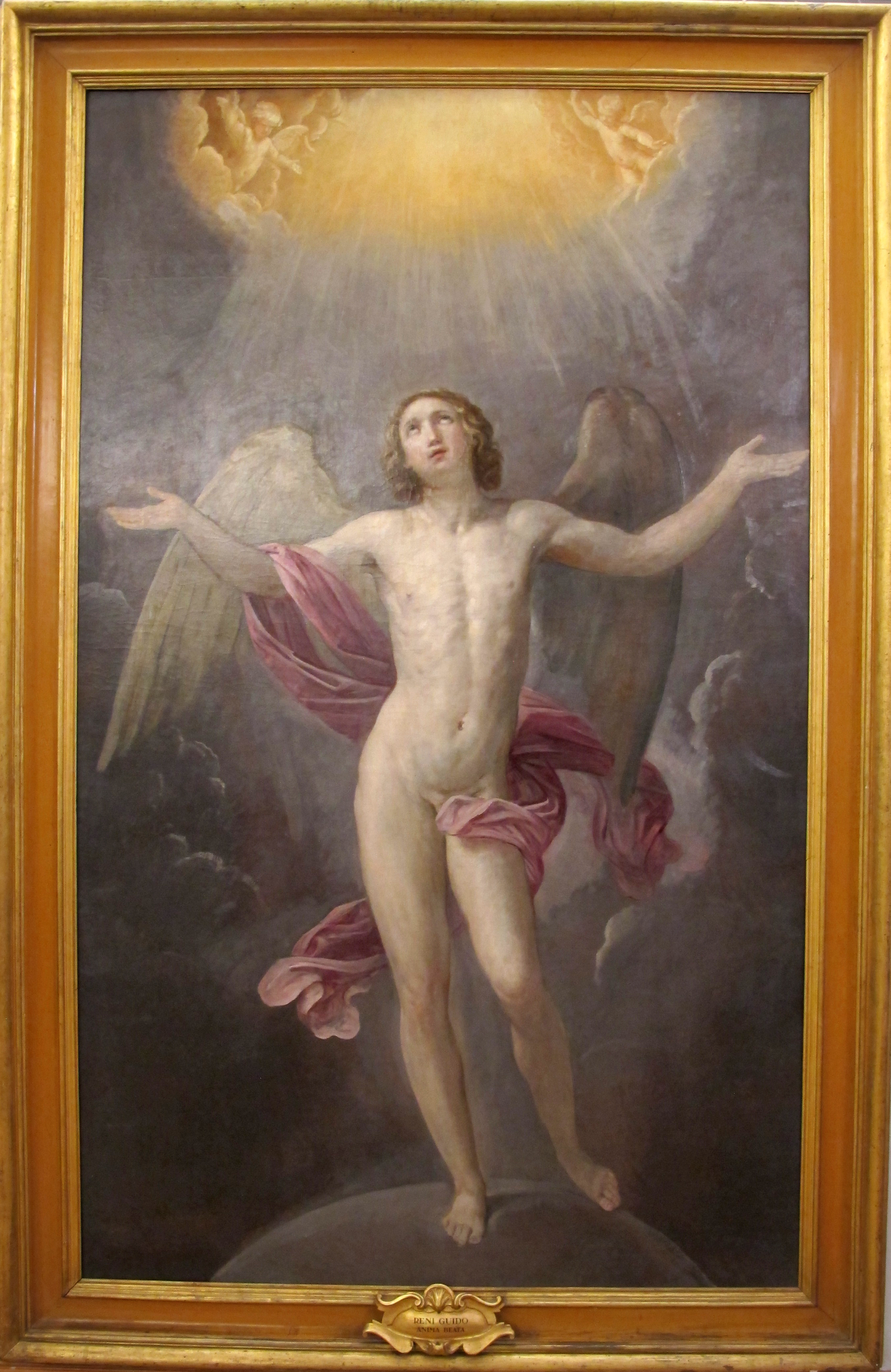 Musei Capitolini (Roma)